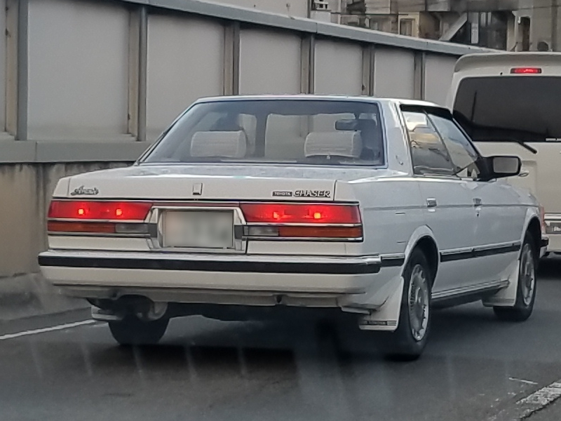 チェイサー 2.0アバンテ（後期型）